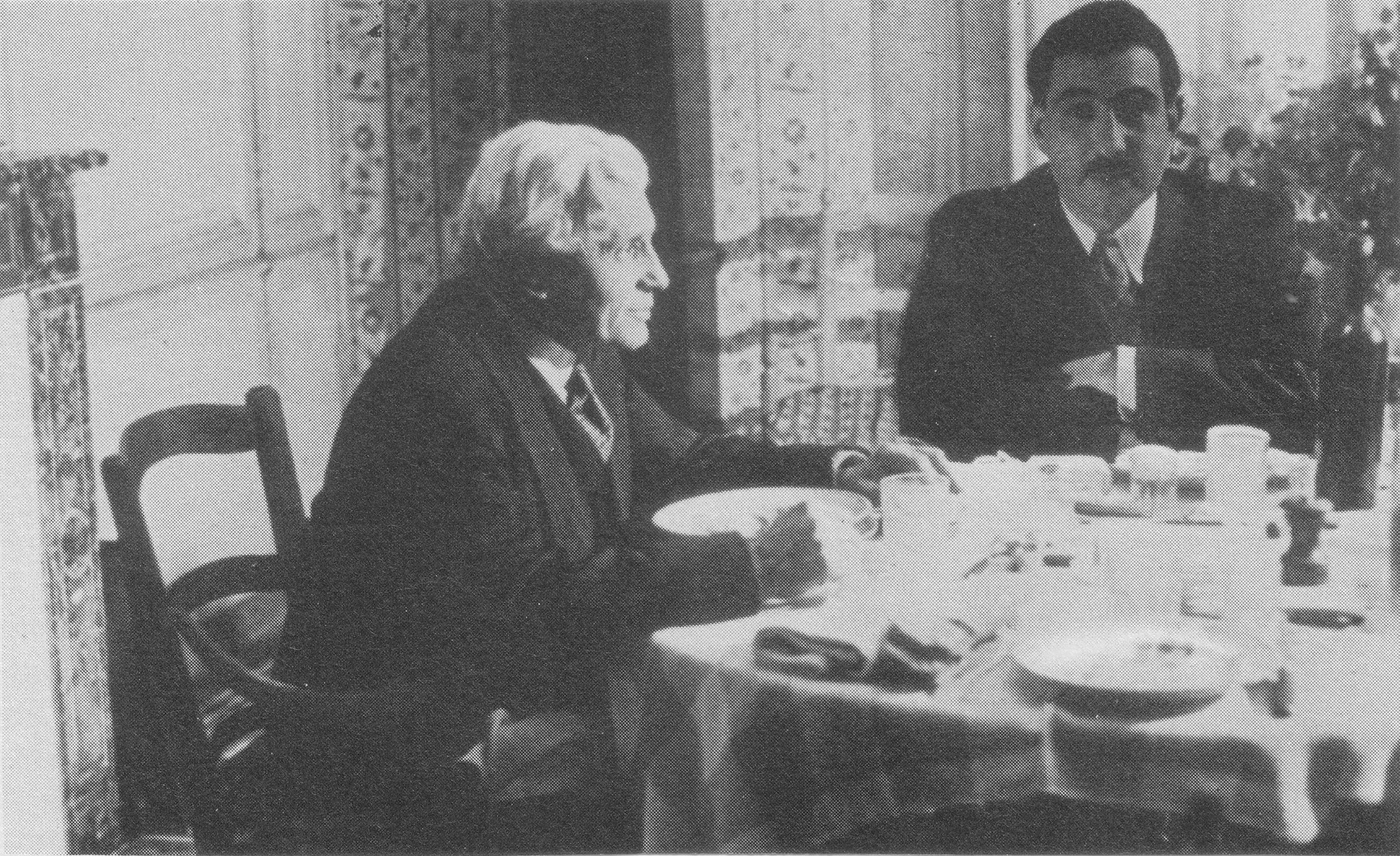 Max Hymans (à droite) déjeunant avec Joseph Paul-Boncour (à gauche), à son domicile de Saint-Aignan.